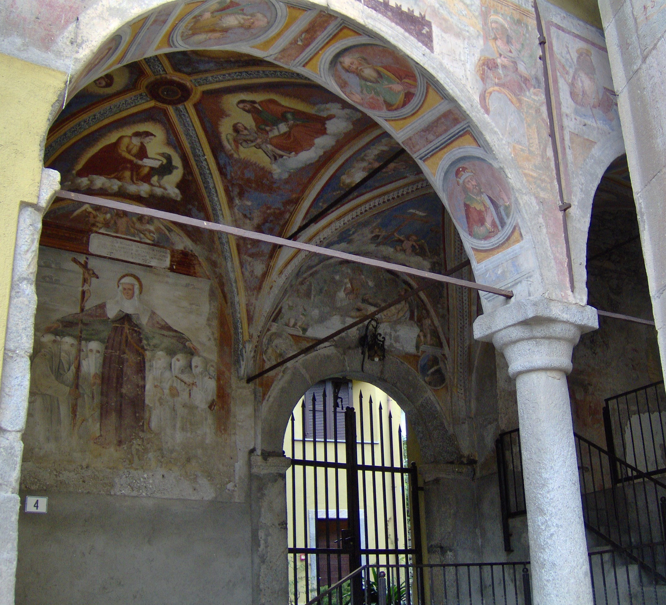 Chiuro (so), portichetto dei Disciplini - foto Romeri M.